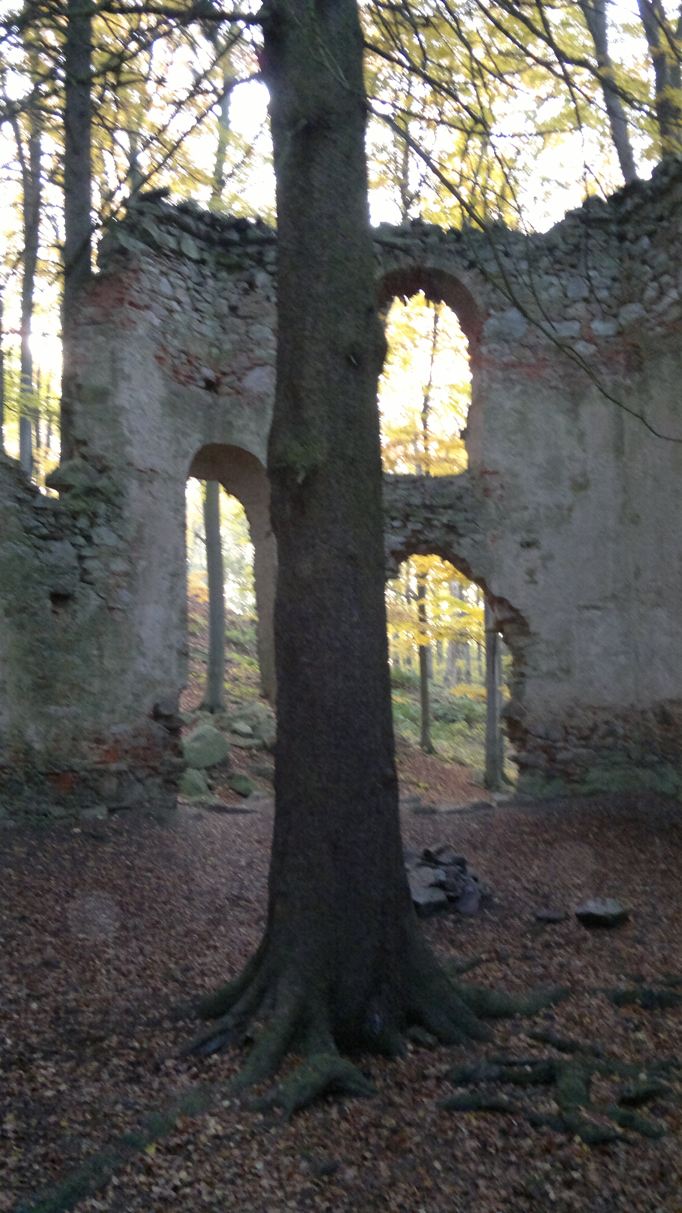 Památný strom Velký Mnich smrk ztepilý uvnitř kaple sv. Máří Magdaleny